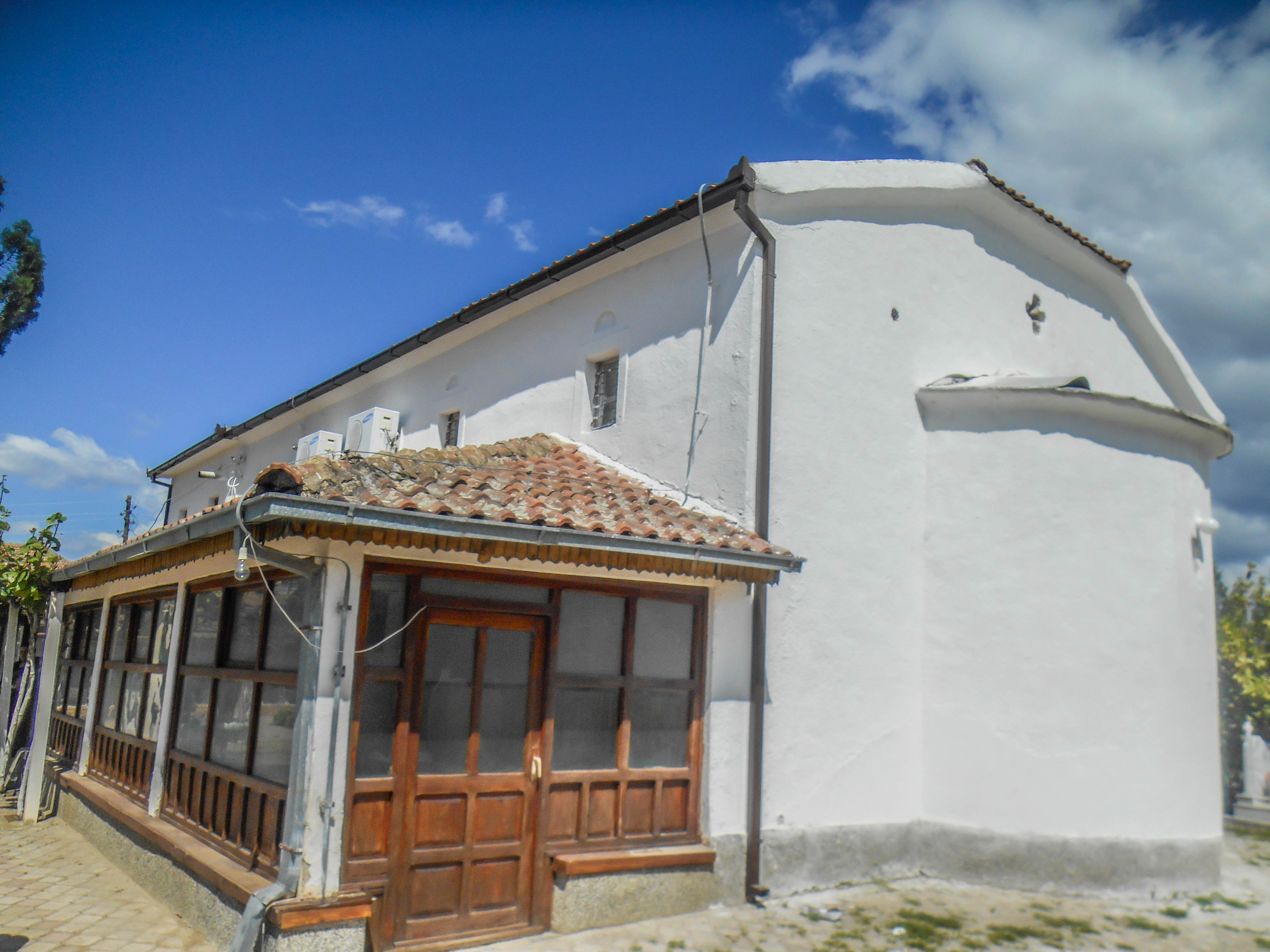 Црква „Св. Ѓорѓи“ - Пиперево